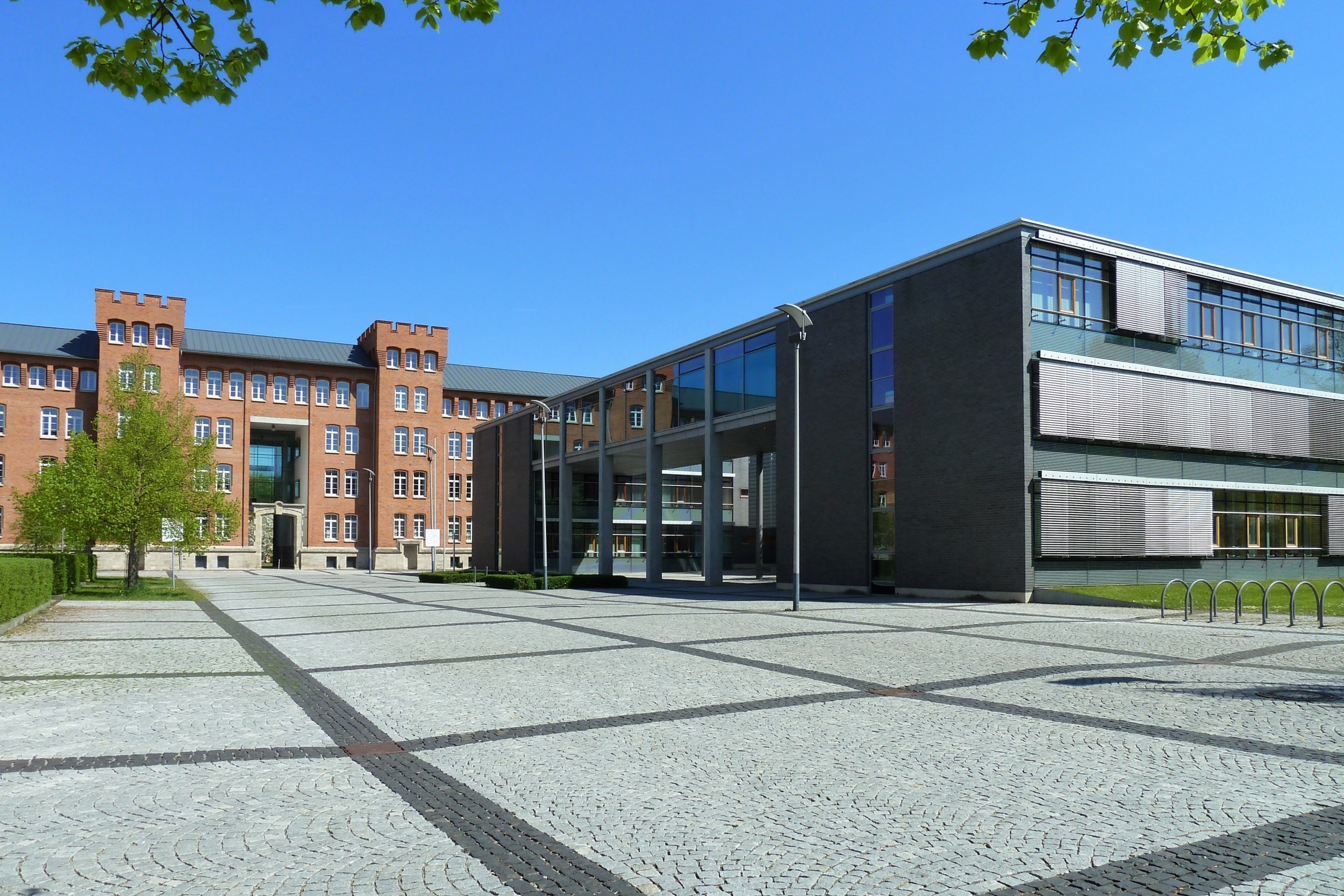 Justizzentrum Meiningen - Hauptgebäude und Neubau